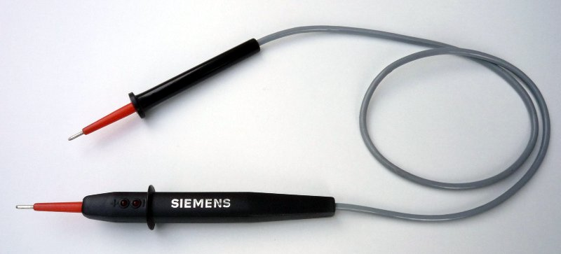 Siemens Universal-Spannungsprüfer aus dem Jahre 1977 (ein frühes Modell mit LED-Anzeige, die lediglich das Vorhandensein einer Spannung zwischen 4,5 und 380 V sowie die Polarität anzeigen konnte)